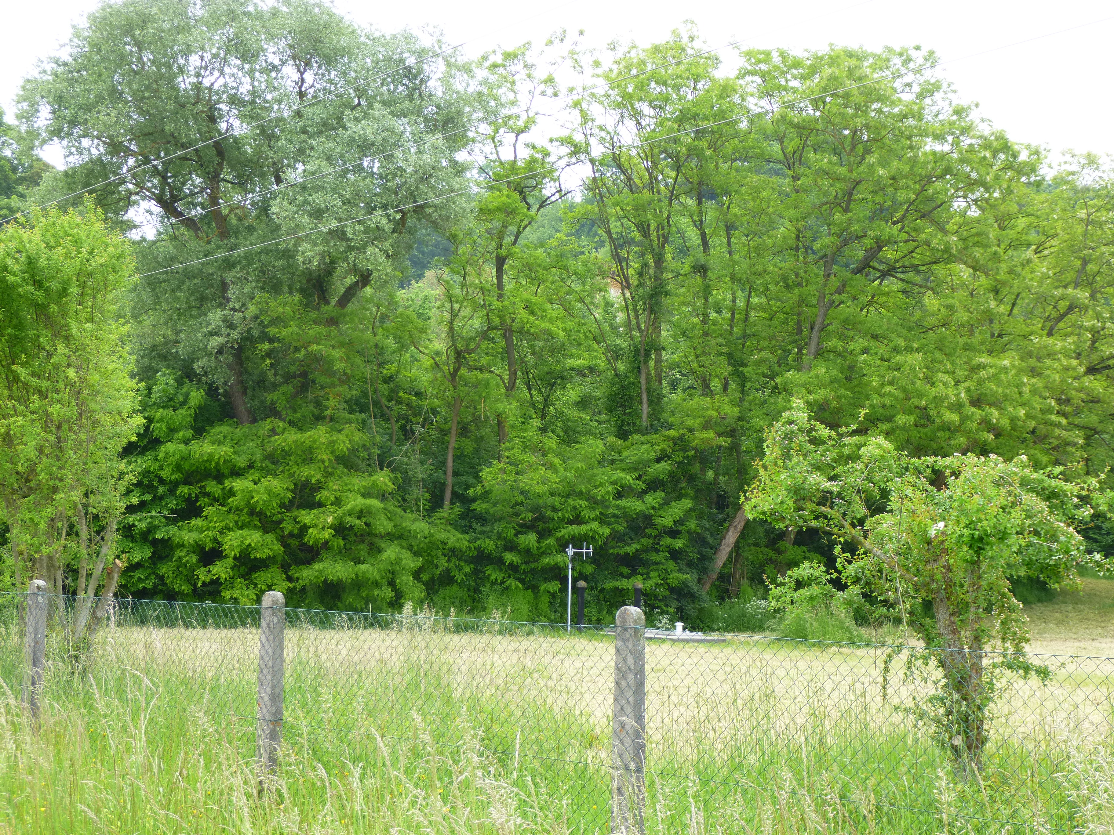 Der ehemalige Steinbruch am Buchberg in Steinach, Ortsteil Münster, ist eingezäunt und nicht zugänglich. Er gehört zu den Geotopen im Landkreis Straubing-Bogen und trägt die Nummer 278A008.